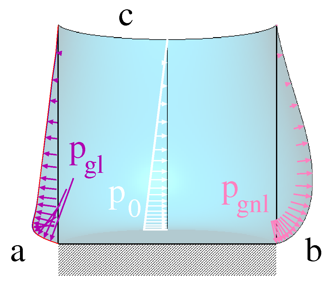 Behälter unter hydrostatischem Druck (weiß), a) geometrisch linear, b) geometrisch nichtlinear gerechnet